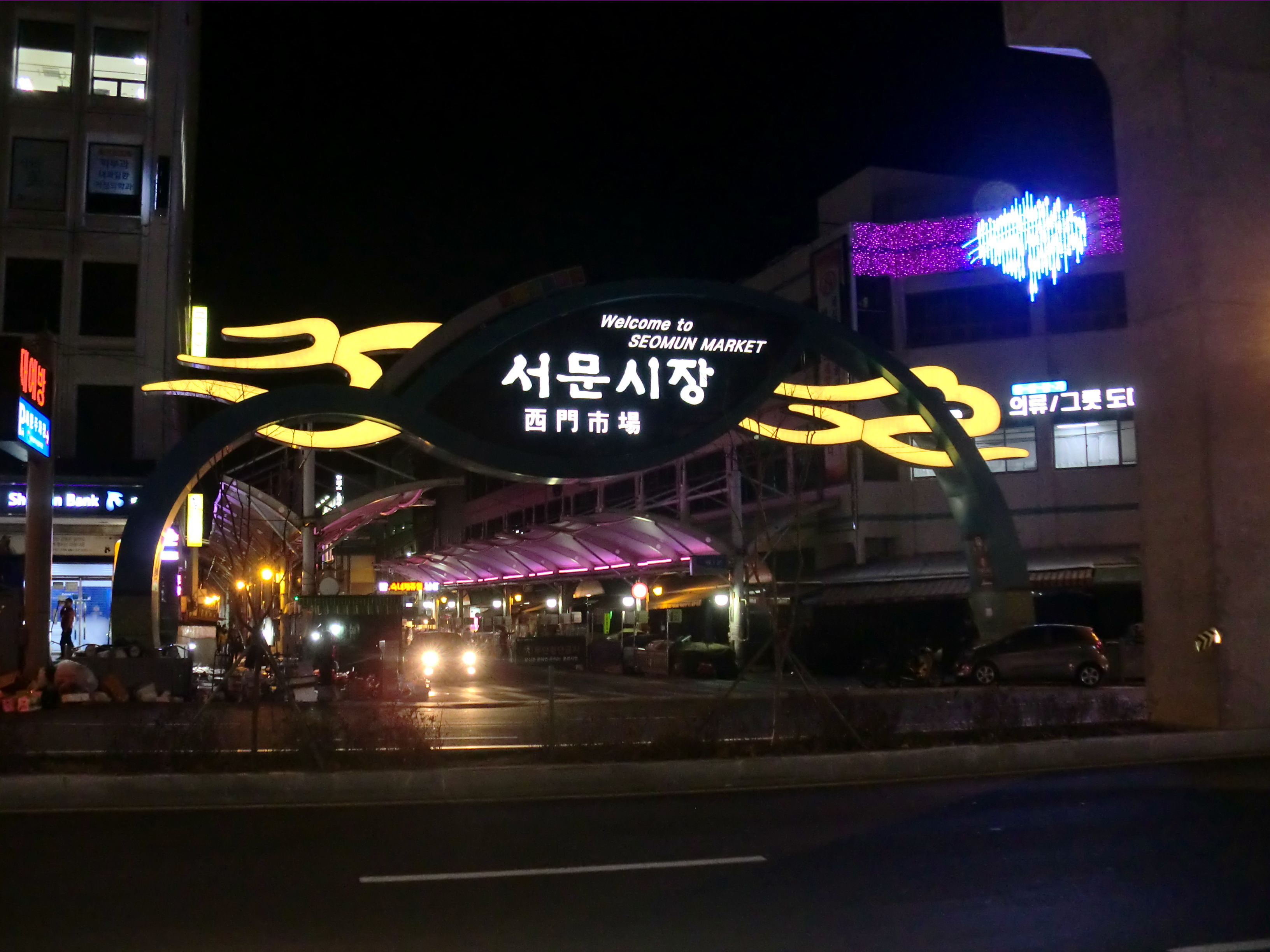 대구광역시에 있는 서문시장입구